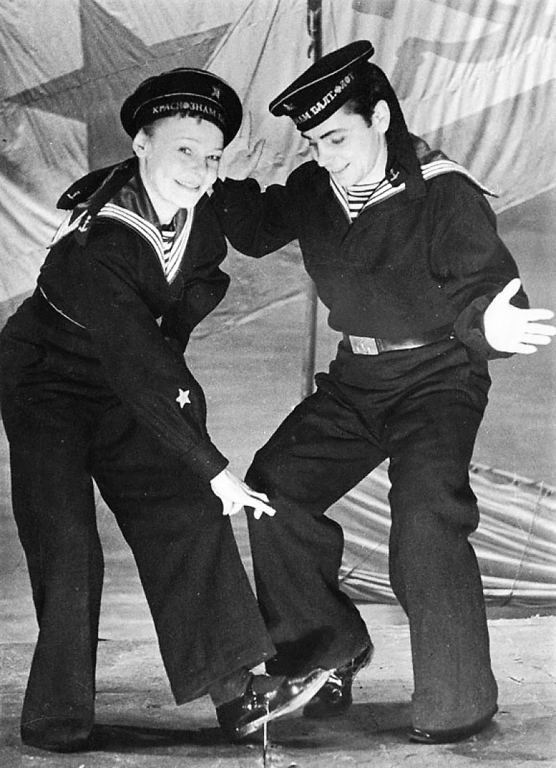 Артисты Ленинградского театра музыкальной комедии Н.В. Пельцер (слева) и А.Г. Комков в сцене из спектакля «Раскинулось море широко»